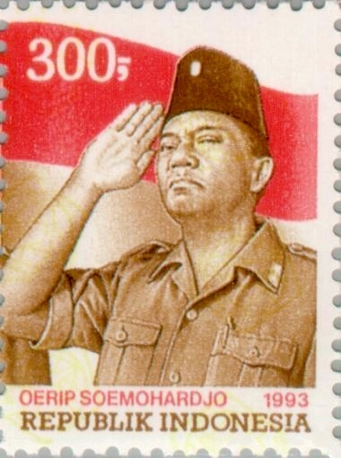 Oerip Soemohardjo